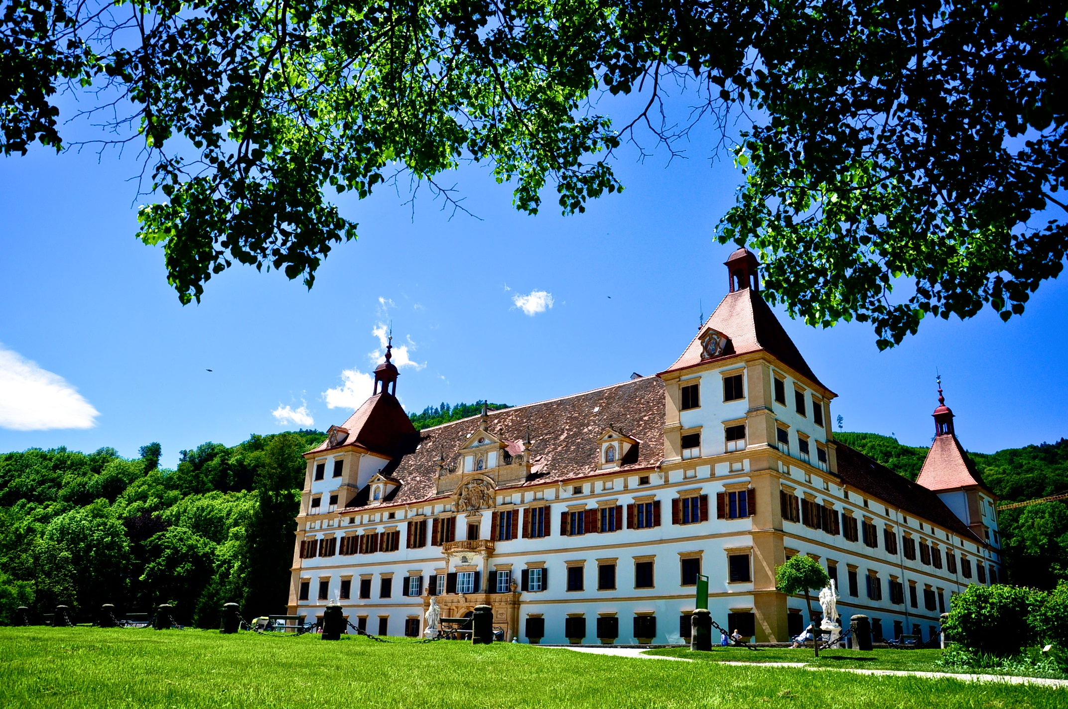 Graz – Schloss Eggenberg. Vom Schloss im Schloss – die Illusion vom perfekten Neubau Dieses Bild wurde anlässlich des österreichischen Tags des Denkmals 2014 in der Steiermark eingereicht. (More images, commons, de)